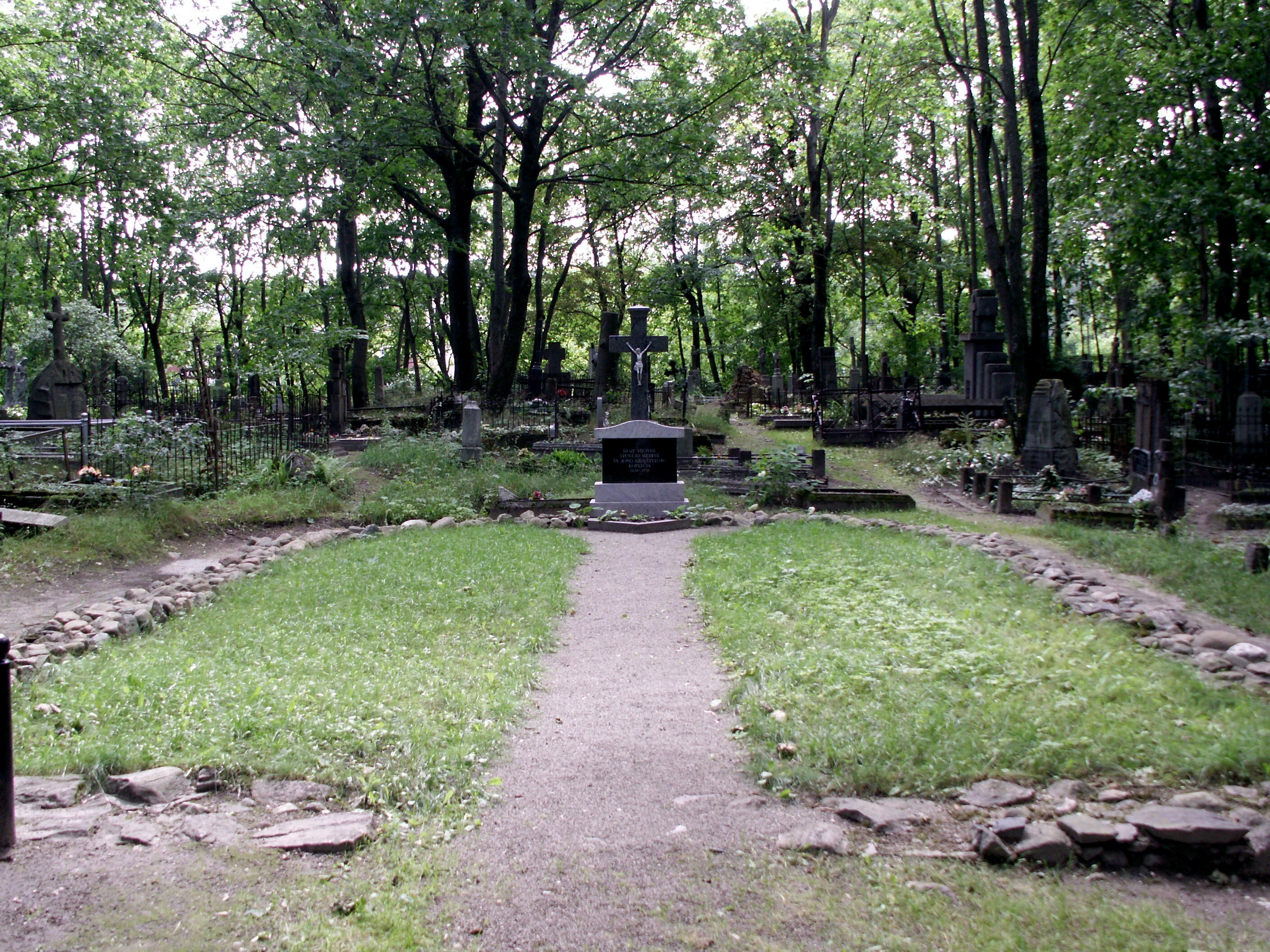 Šiaulių senosios kapinės. Buvusios 1830 m. koplyčios vieta